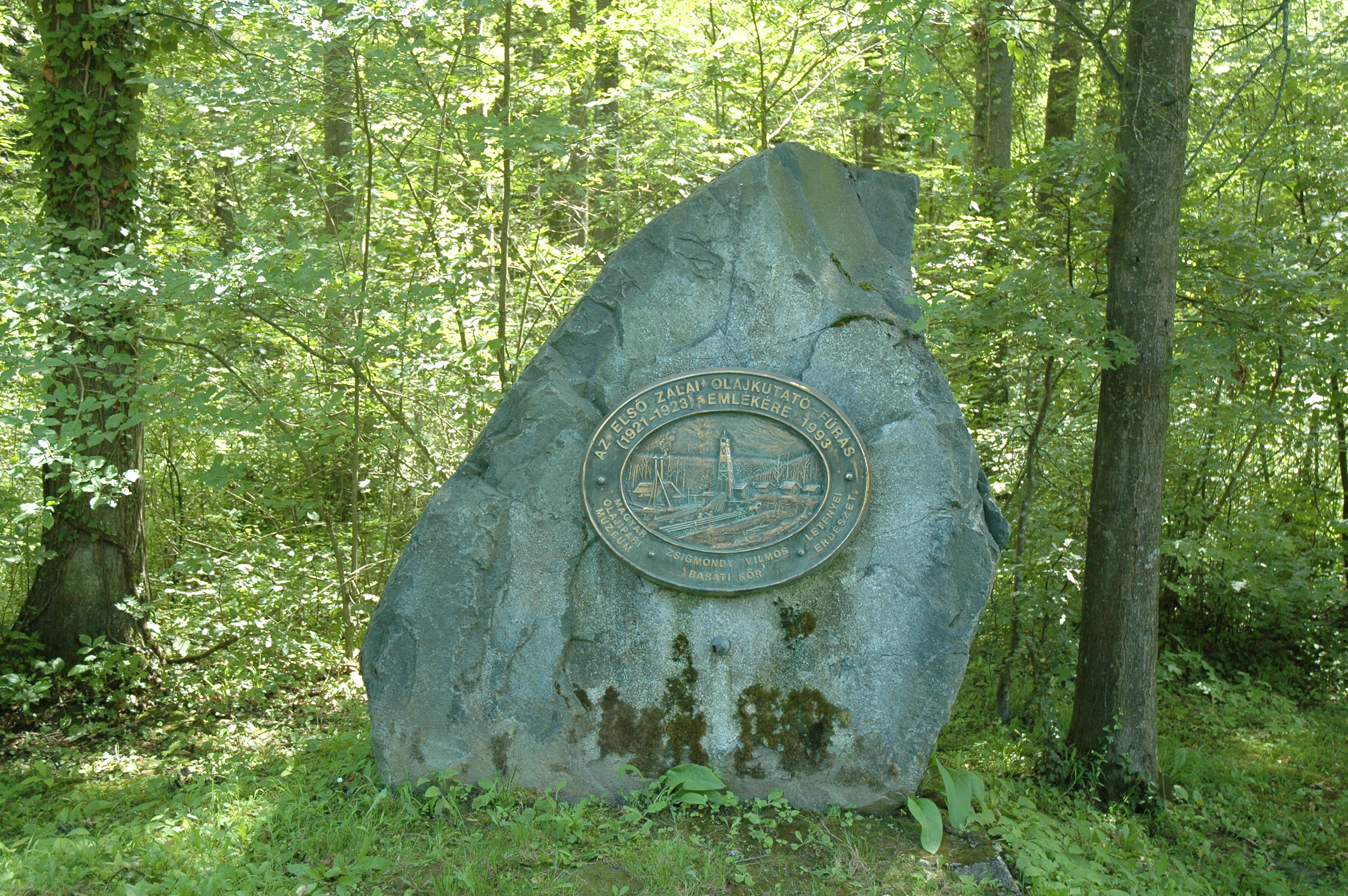 Memorial of oil exploration performed in Budafapuszta region from 1921 to 1923